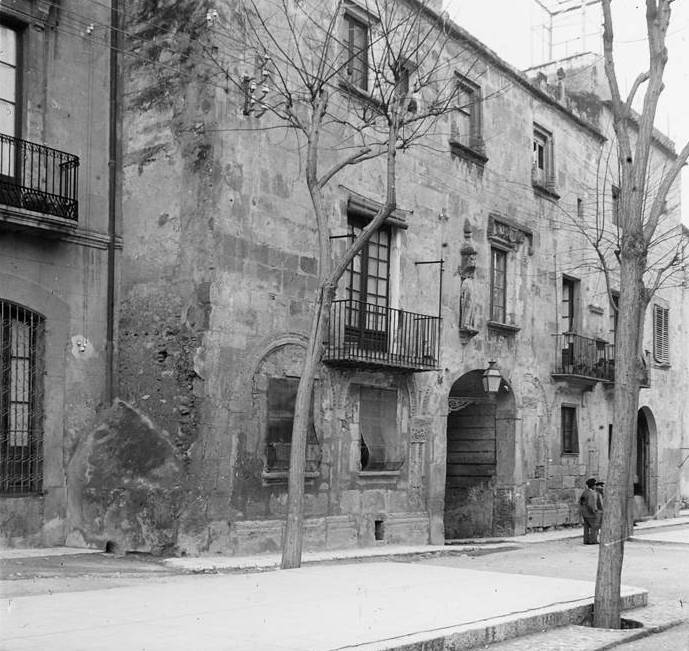 Antic hospital de Tarragona. Josep Salvany i Blanch (1915)